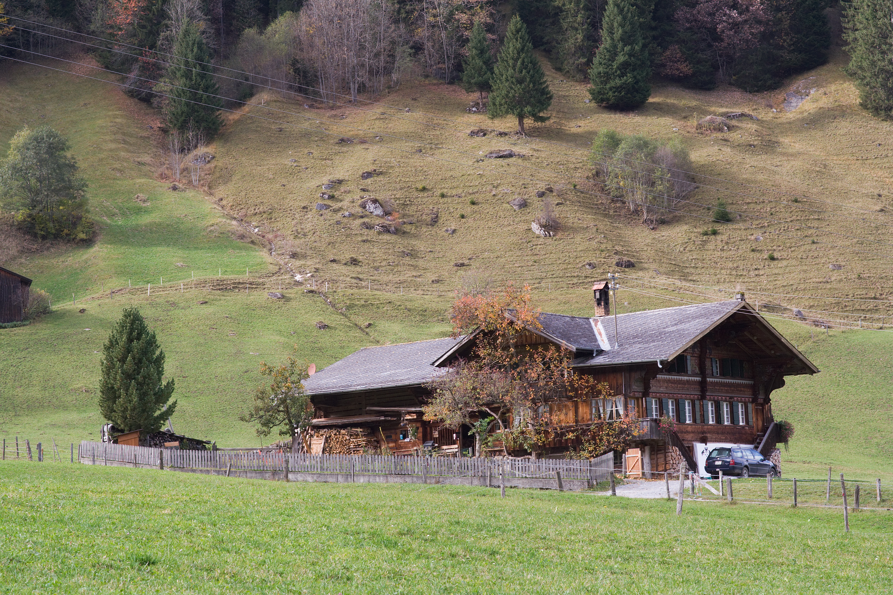 Chalet in Pöschenried, Gemeinde Lenk, Schweiz